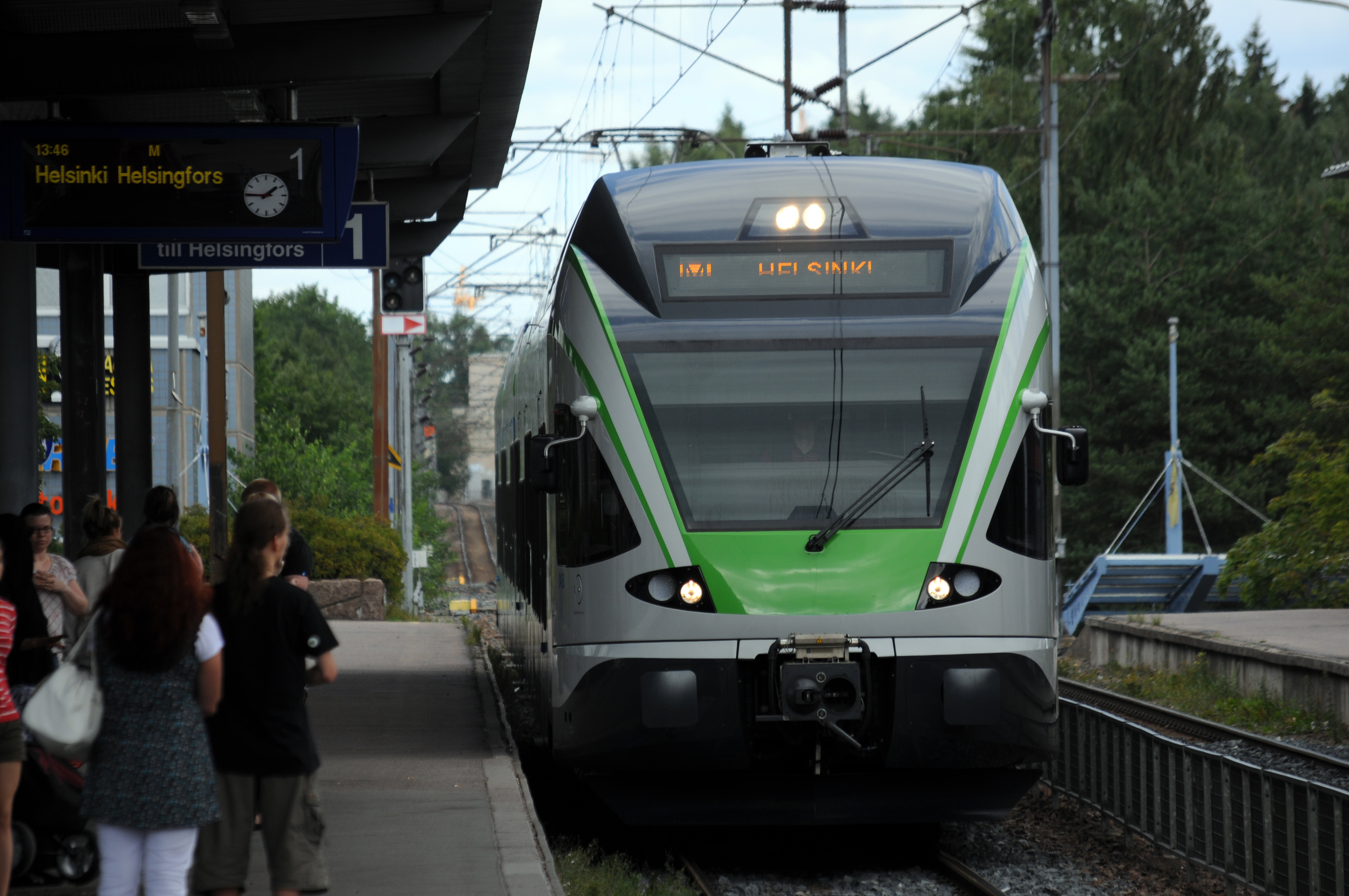 Helsinki